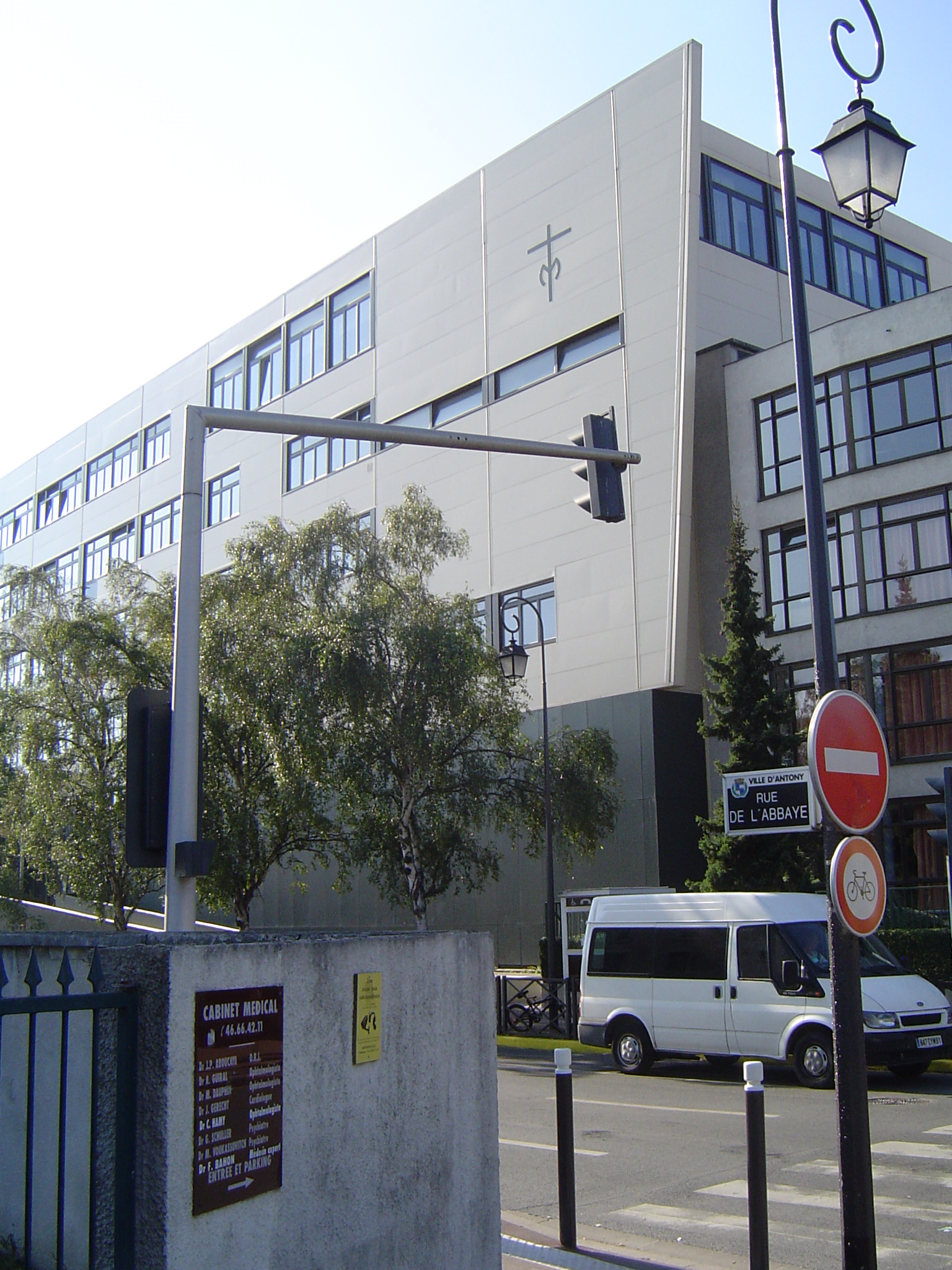 Photo prise à Antony (France)